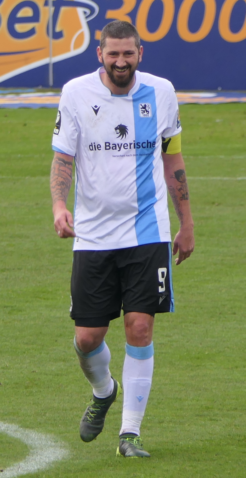 Der Fussballprofi Sascha Mölders im Trikot vom TSV 1860 München beim Heimspiel gegen Eintracht Braunschweig am 26.01.2020.